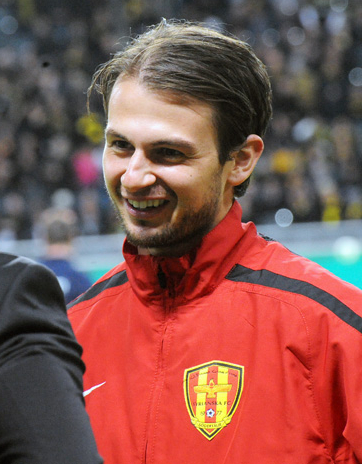 Besim Kunić